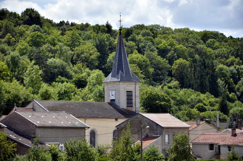 Eglise de Pierre-la-Treiche